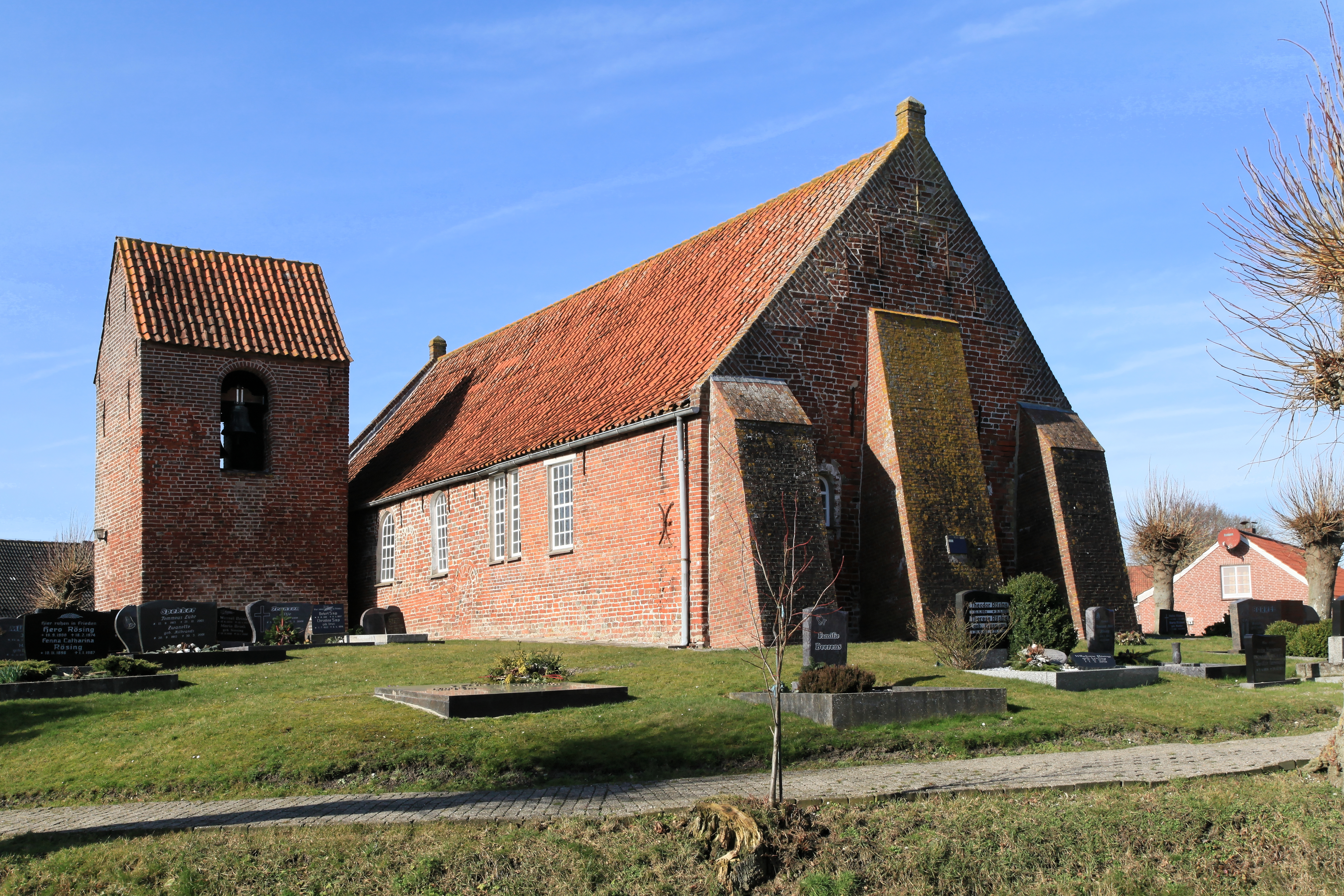 Friedhof, Kirche und Glockenturm, Achter'd Kark in Critzum, Jemgum